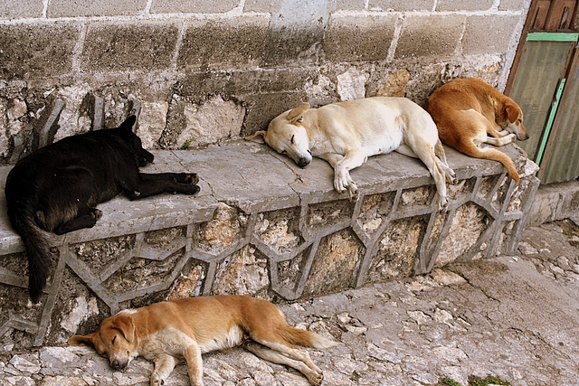 San Christobal de las Casa, Chiapas, Mexico